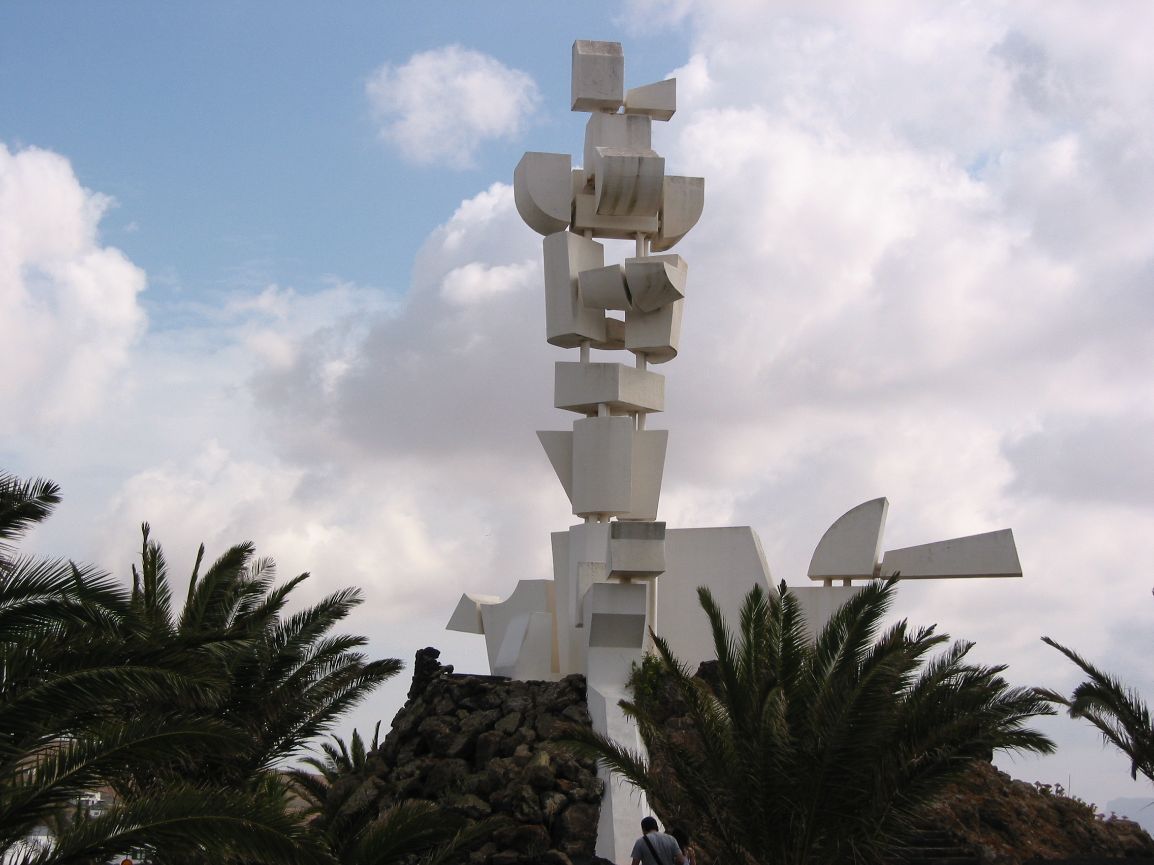 Monumento al Campesino (San Bartolomé, Lanzarote, Spain)